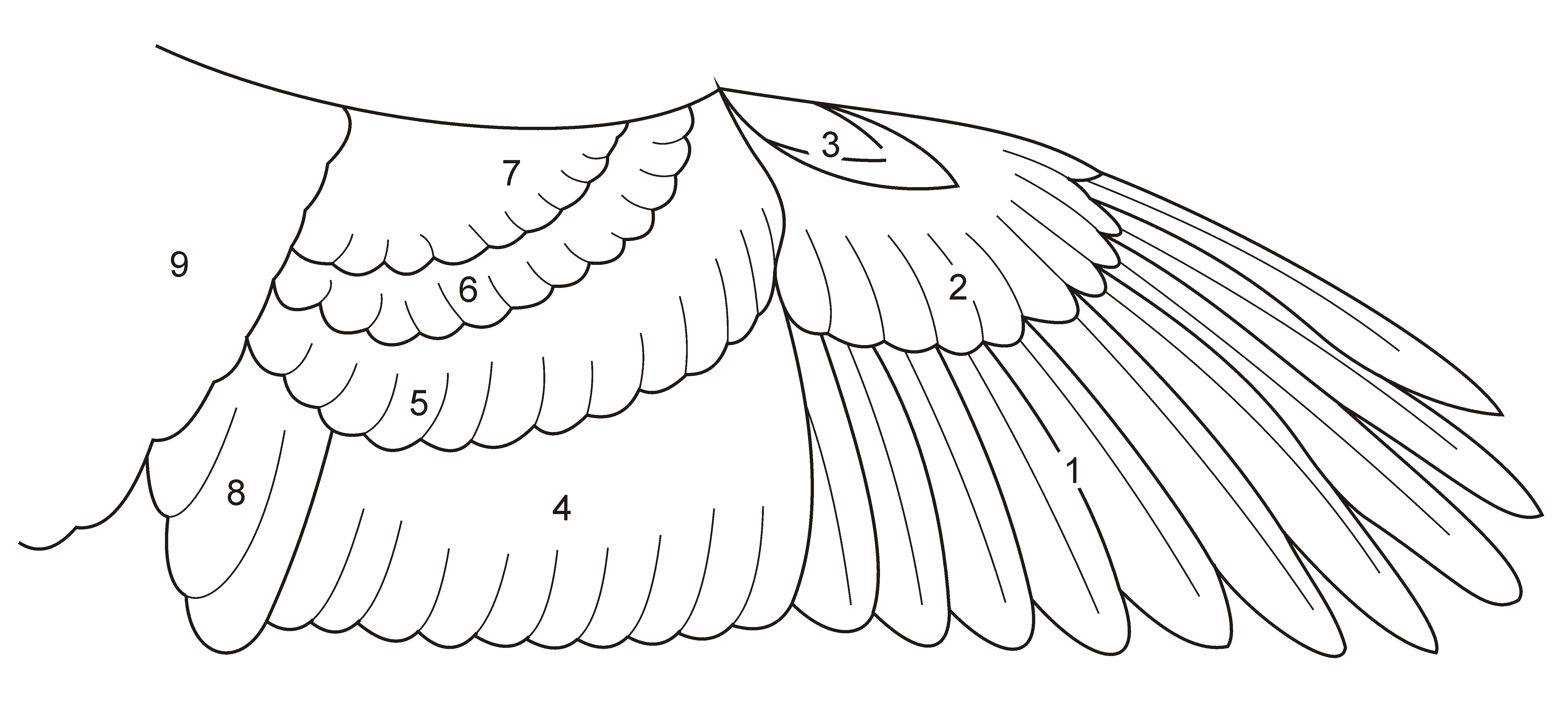 Drawing of idealised feathers in a bird's wing. Português / English / Español 1. Remiges primárias / Primary remiges / Remeras primarias 2. Penas de cobertura primárias / Greater primary coverts / Cobertoras mayores 3. Álula / Alula / Álula 4. Remiges secundárias / Secondary remiges / Remeras secundarias 5. Penas de cobertura secundárias / Greater secondary coverts / Cobertoras secundarias mayores 6. Penas de cobertura secundárias / Median secondary coverts / Cobertoras secundarias medianas 7. Penas de cobertura secundárias / Lesser secondary coverts / Cobertoras secundarias menores 8. Remiges terciárias / Tertiary remiges / Remeras terciarias 9. Escapulares / Scapulares / Escapulares